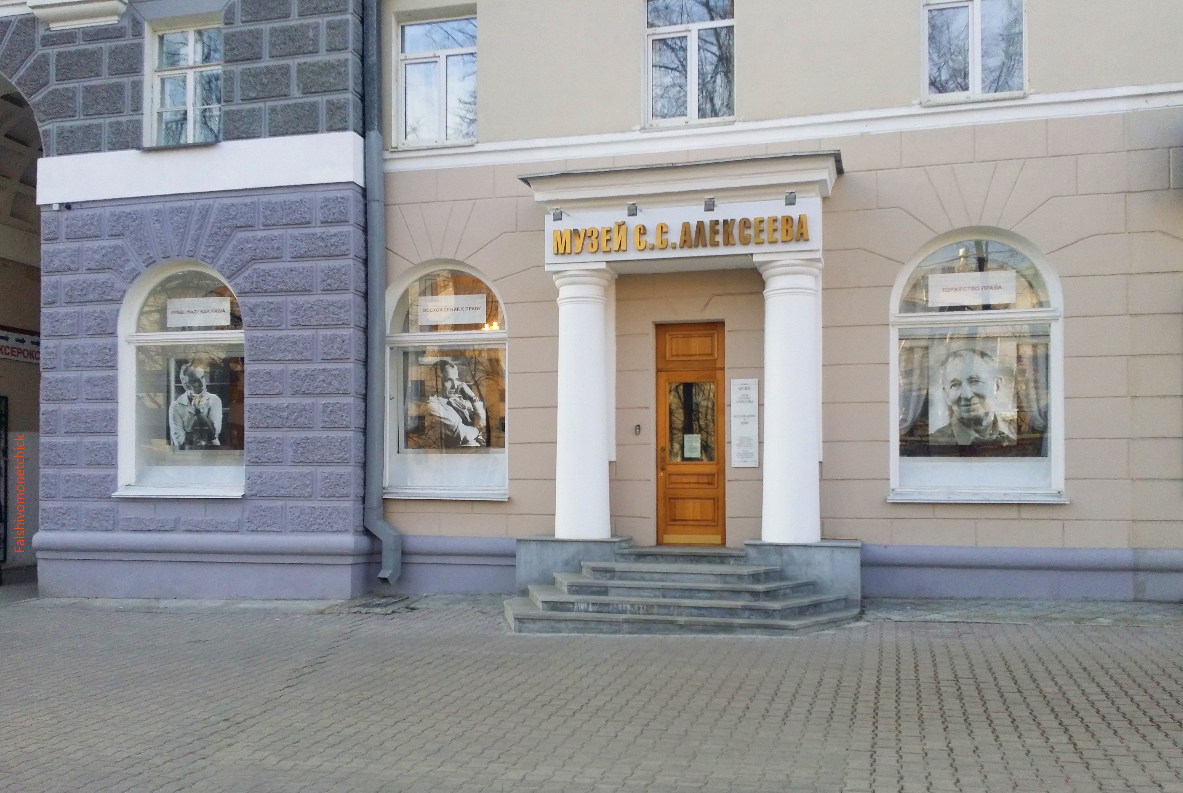 Музей С.С, Алексеева в Екатеринбурге, проспект Ленина, 101